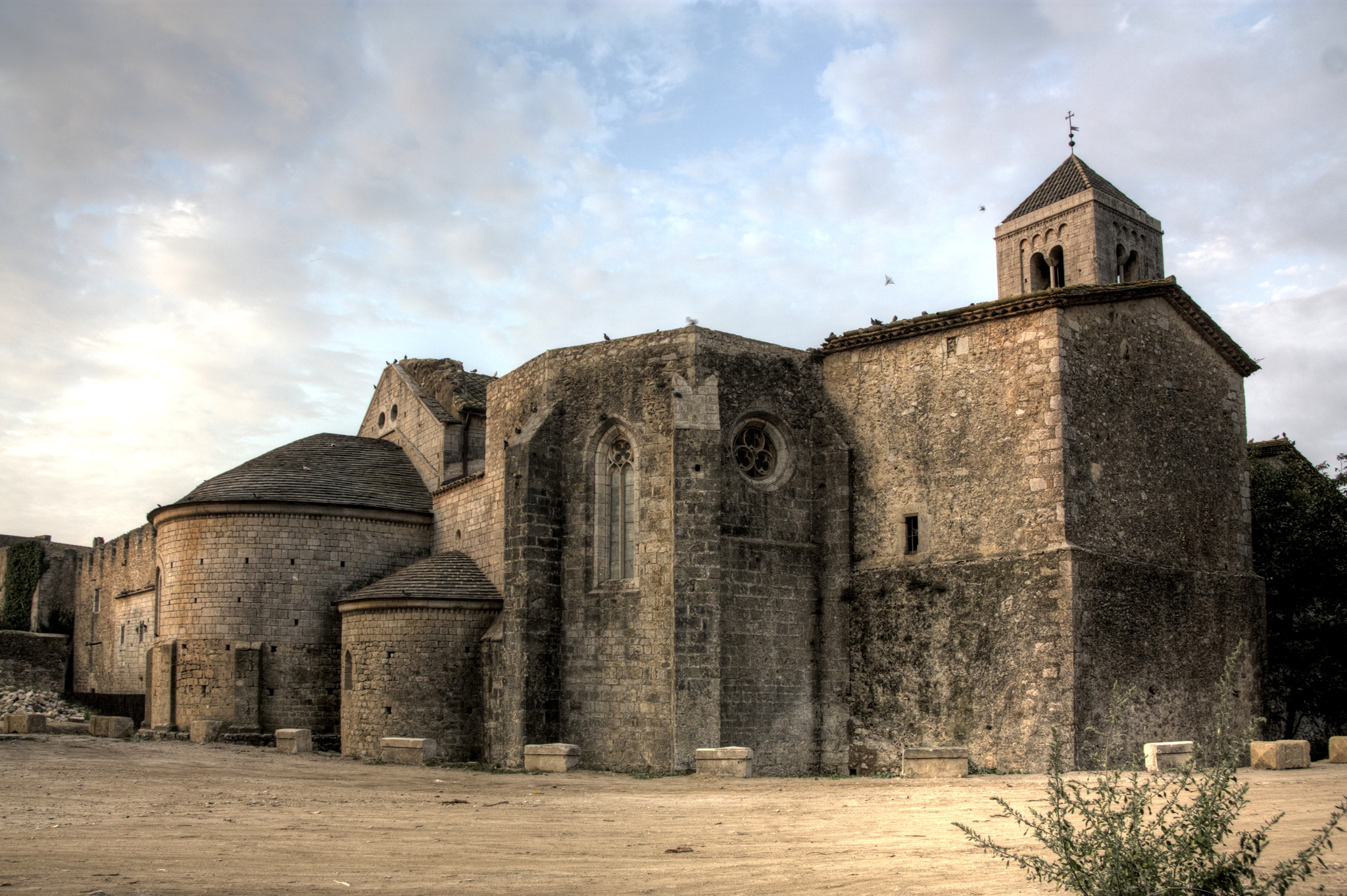 Canònica de Santa Maria de Vilabertran